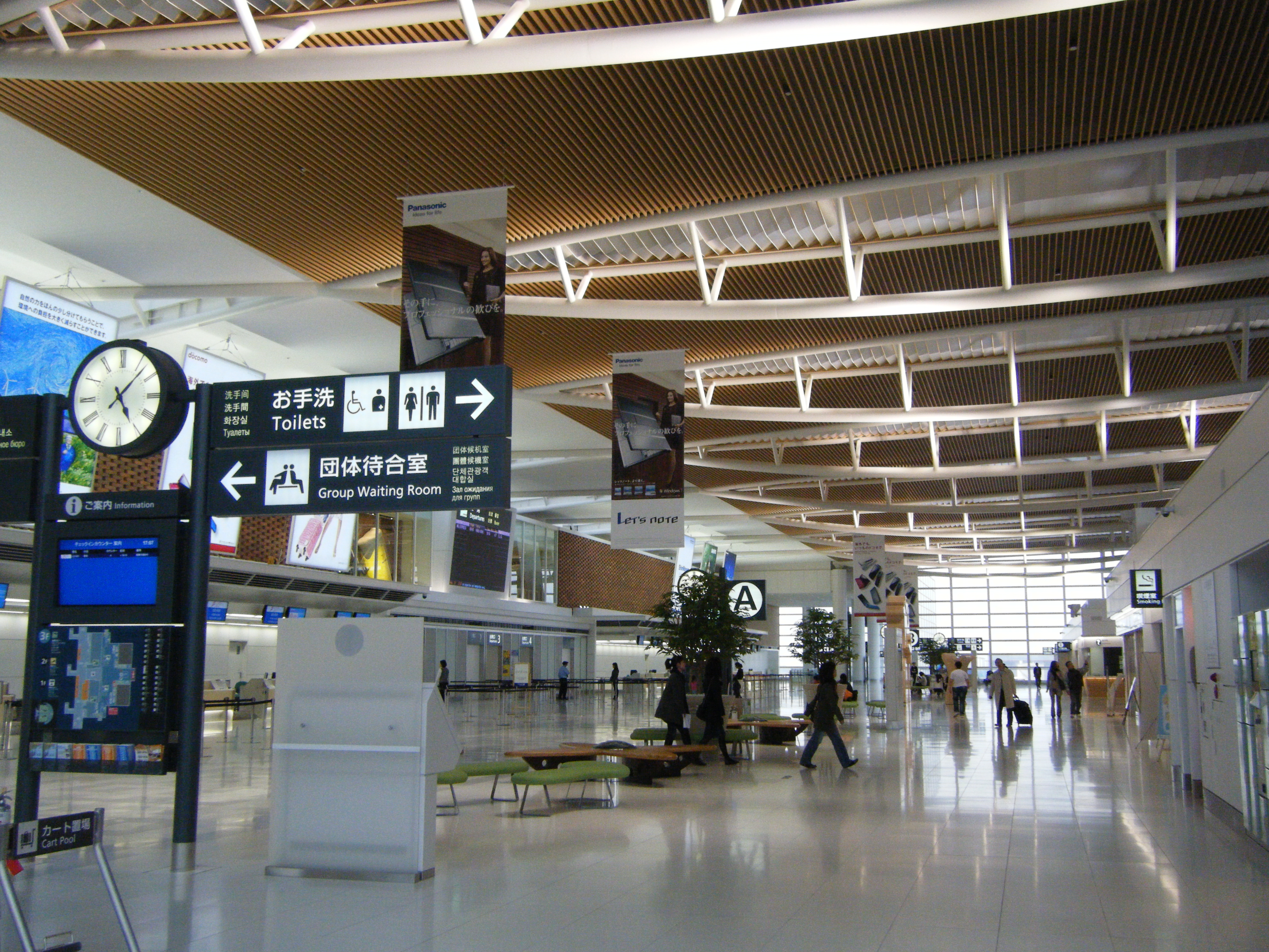 新千歳空港国際線ターミナルビル内部